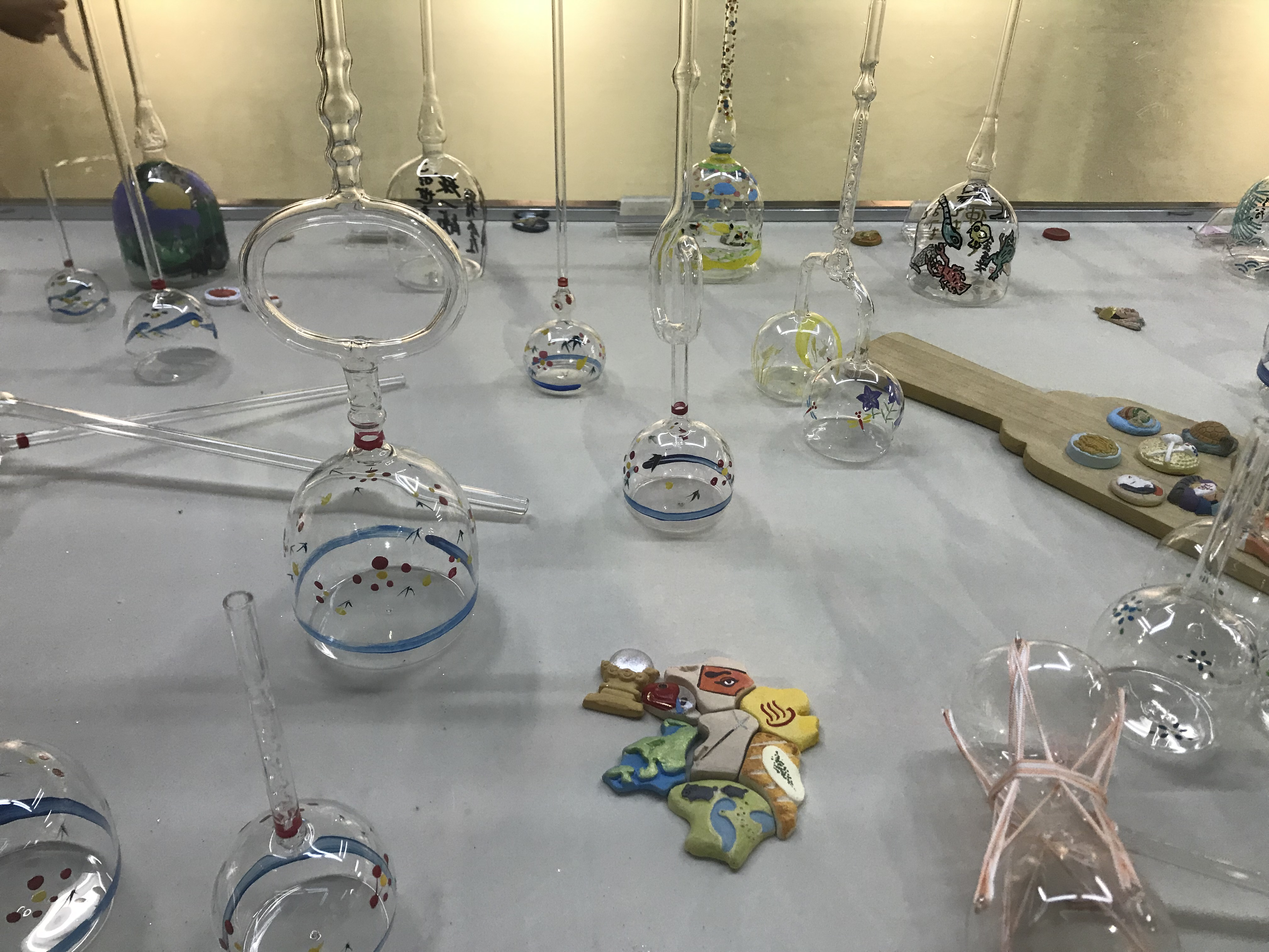 筥崎宮放生会